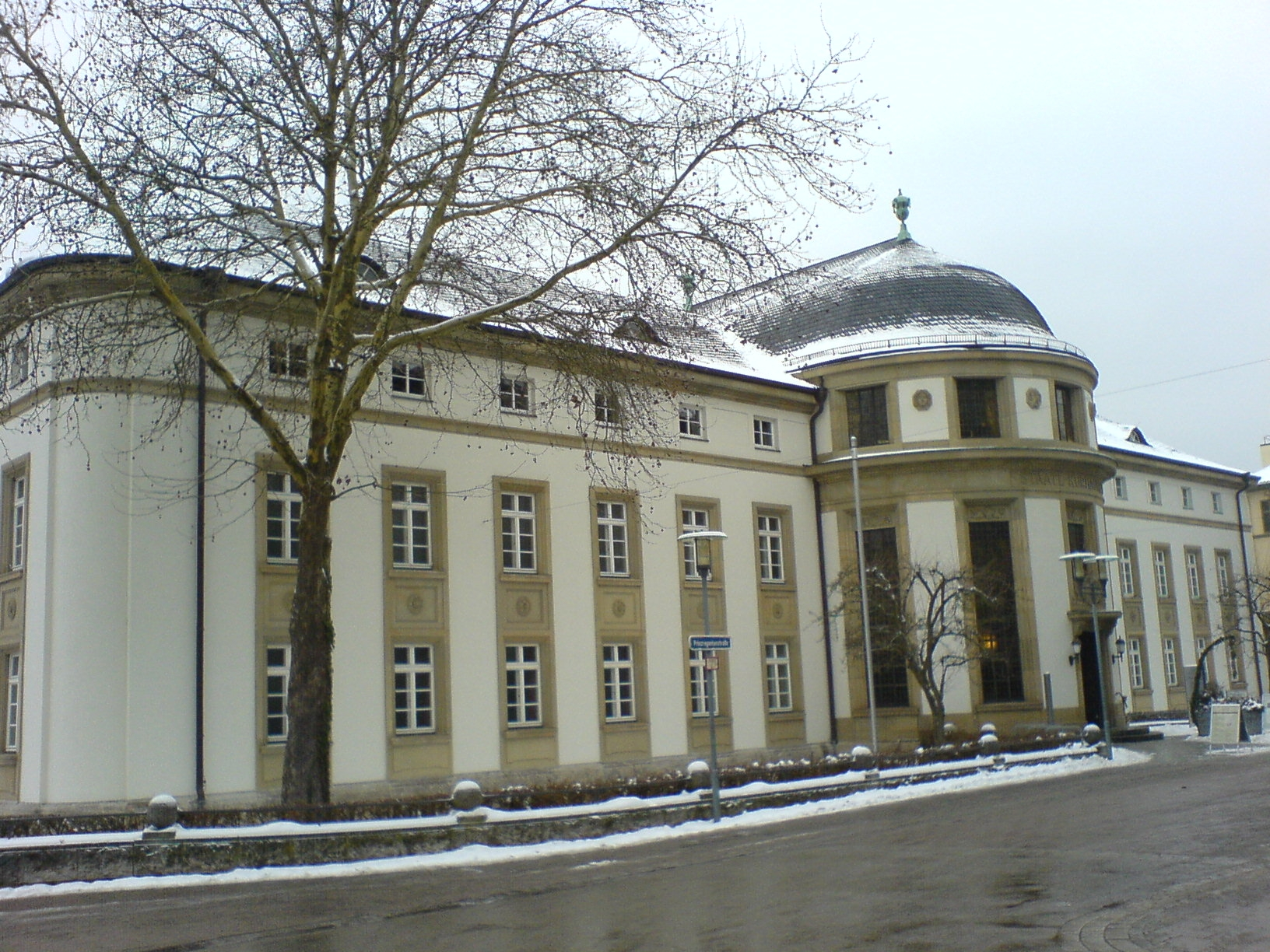 Staatliches Kurhausbad in Bad Kissingen, Prinzregentenstraße 6, Bj. 1926–1928, Außenansicht.